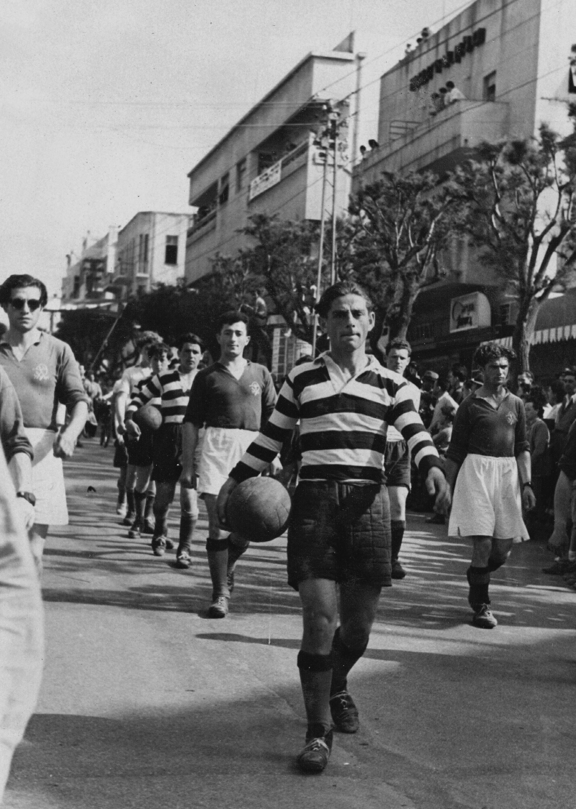 The football team of Hapoel participates in the May Day Parade in Tel Aviv. קבוצת הכדורגל, הפועל, צועדת ברחובות תל אביב כחלק ממצעד האחד במאי 05/01/1949